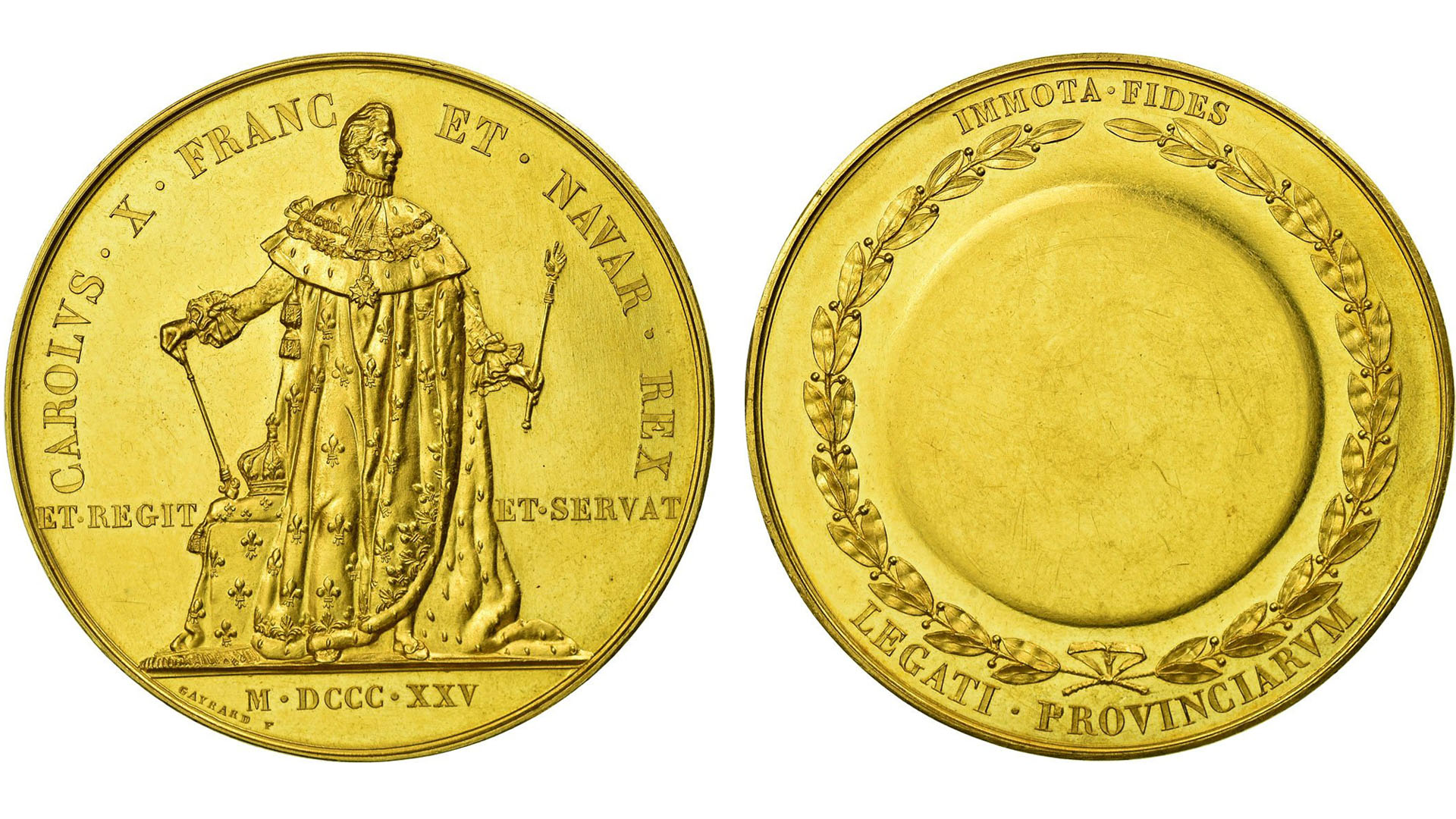 Médaille du sacre de Charles X du 29 mai 1825 par Gayrard Cette médaille fait partie de la série officielle des médailles de sacre de Charles X et fut remise aux représentants des provinces françaises.